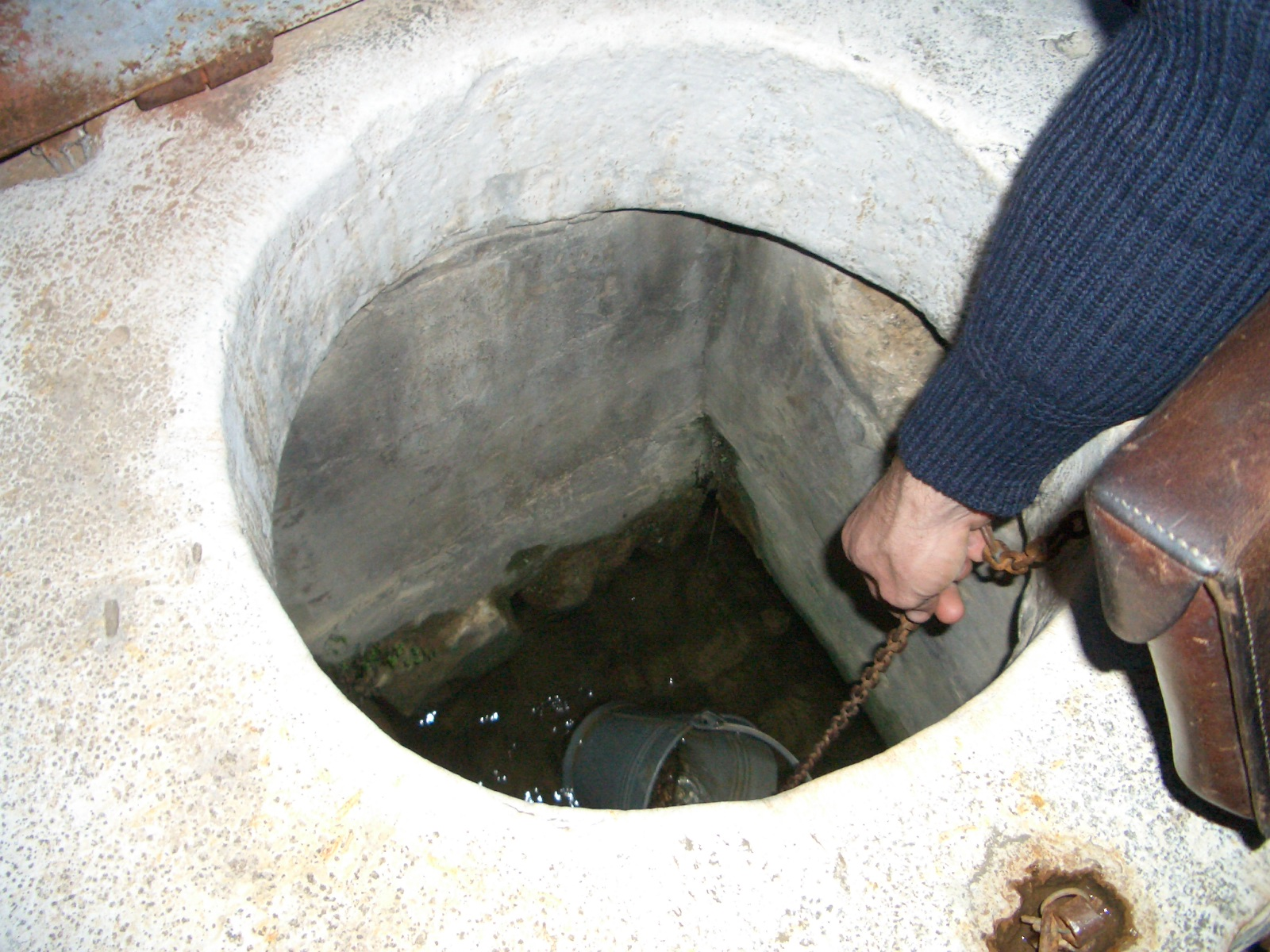 Cistern, getting water